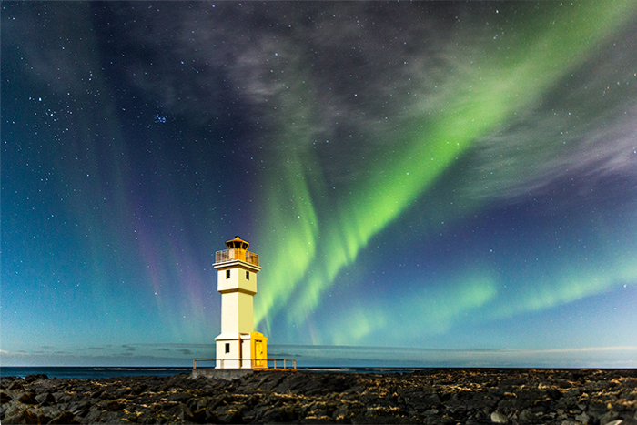 Leuchtturm Akranes Iceland